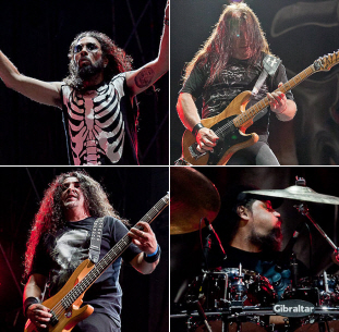 Malón en 2012. De izquierda a derecha y de arriba a abajo: Claudio O'Connor, Antonio Romano, Karlos Cuadrado, Claudio Strunz